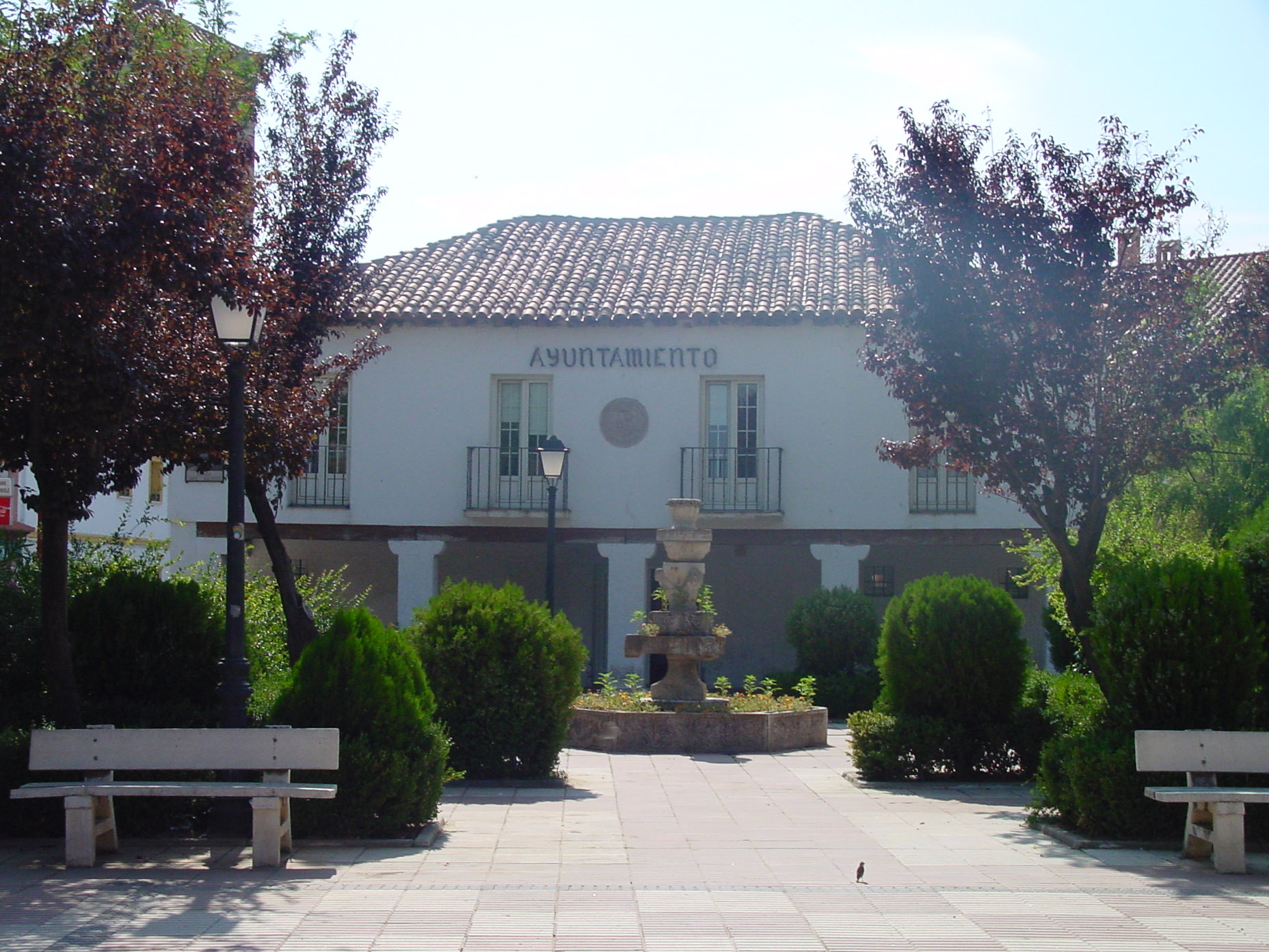 Ayuntamiento de Camarma de Esteruelas.